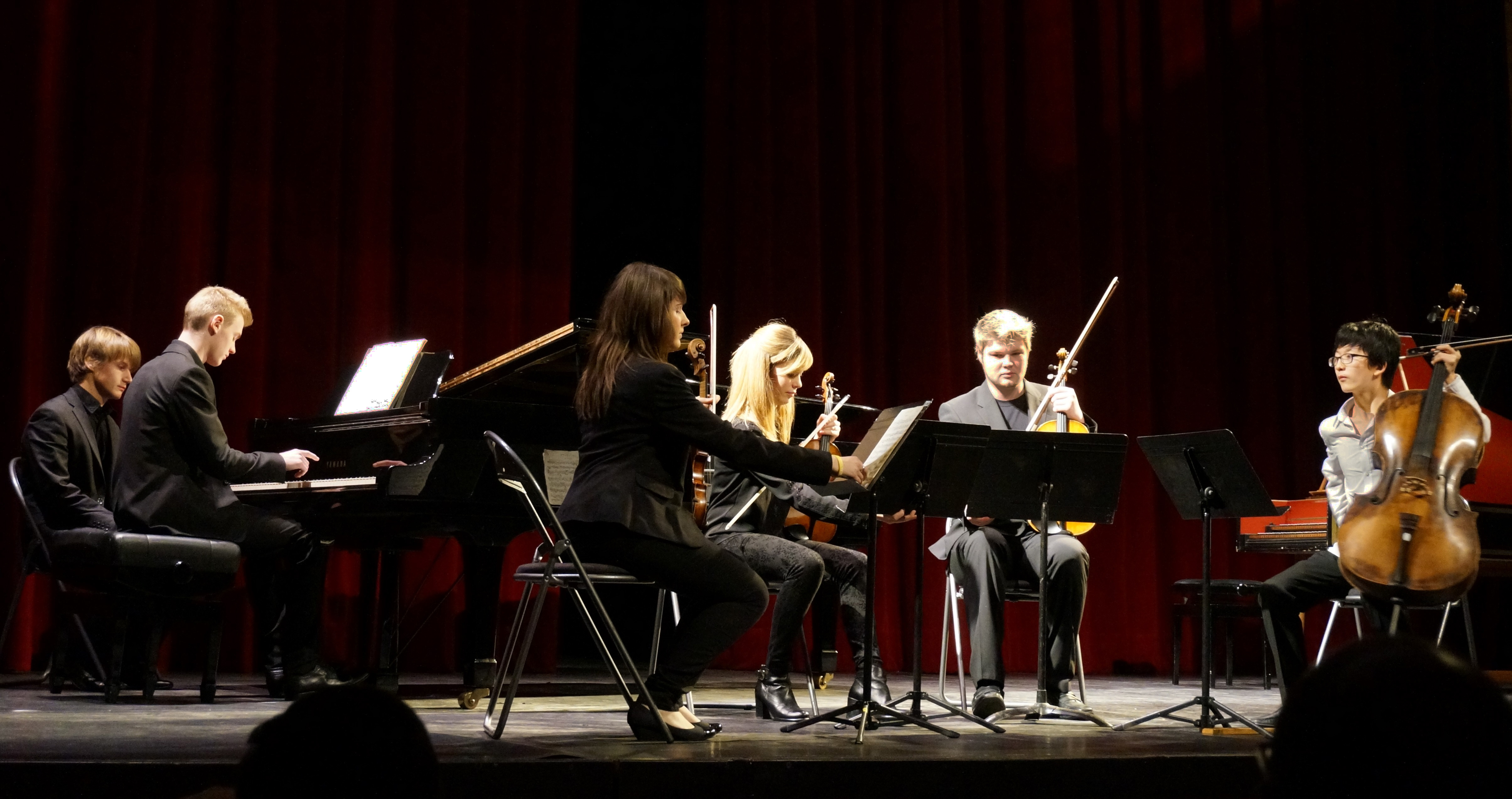 Jeunes musiciens lors d'un concert.